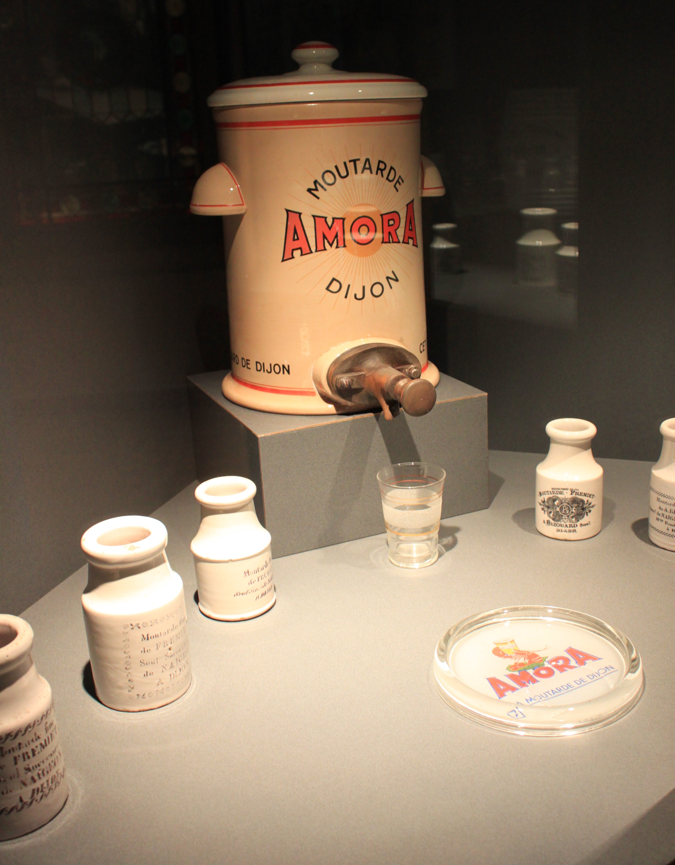 Musée de la vie bourguignonne, Dijon, Bourgogne, France